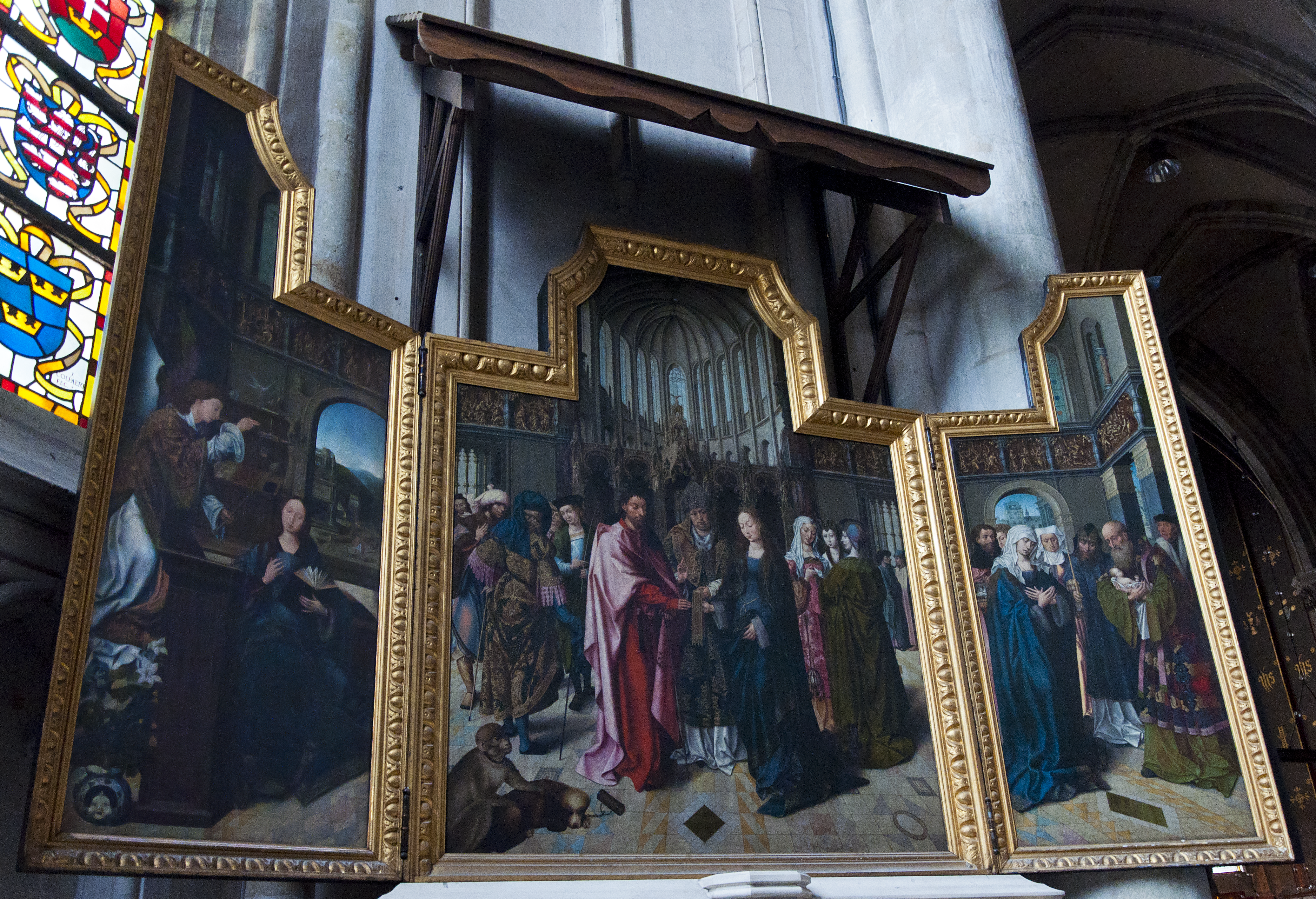 De Colibranttriptiek door Goswin van der Weyden in de Sint-Gummaruskerk te Lier, België